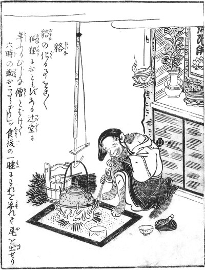 Mujina (狢, a shapeshifting badger) from the Konjaku Gazu Zoku Hyakki (今昔画図続百鬼)